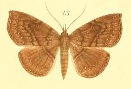 Aburina sobrina Möschler, 1887